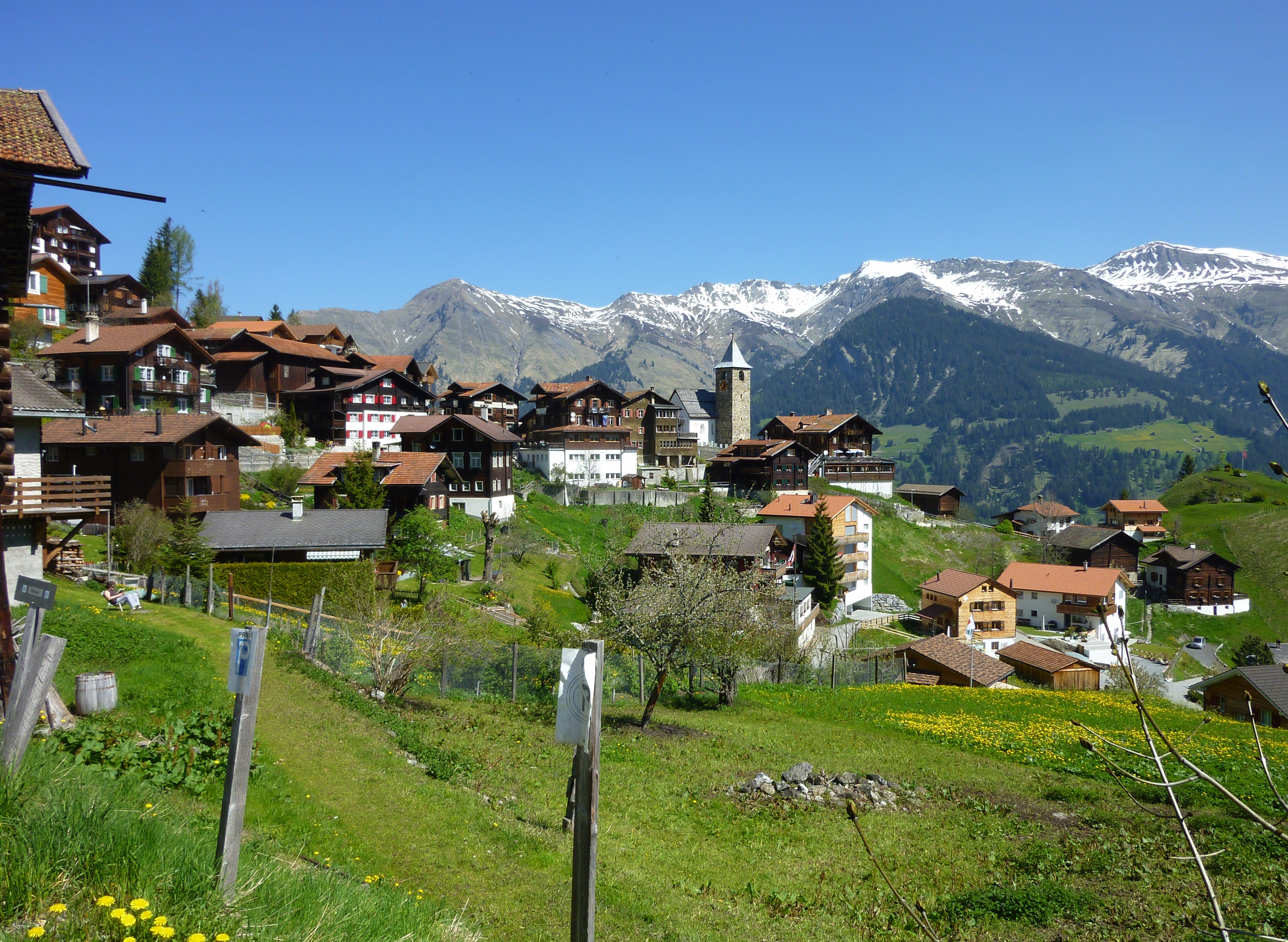 Tschierten, Ansicht von Süden